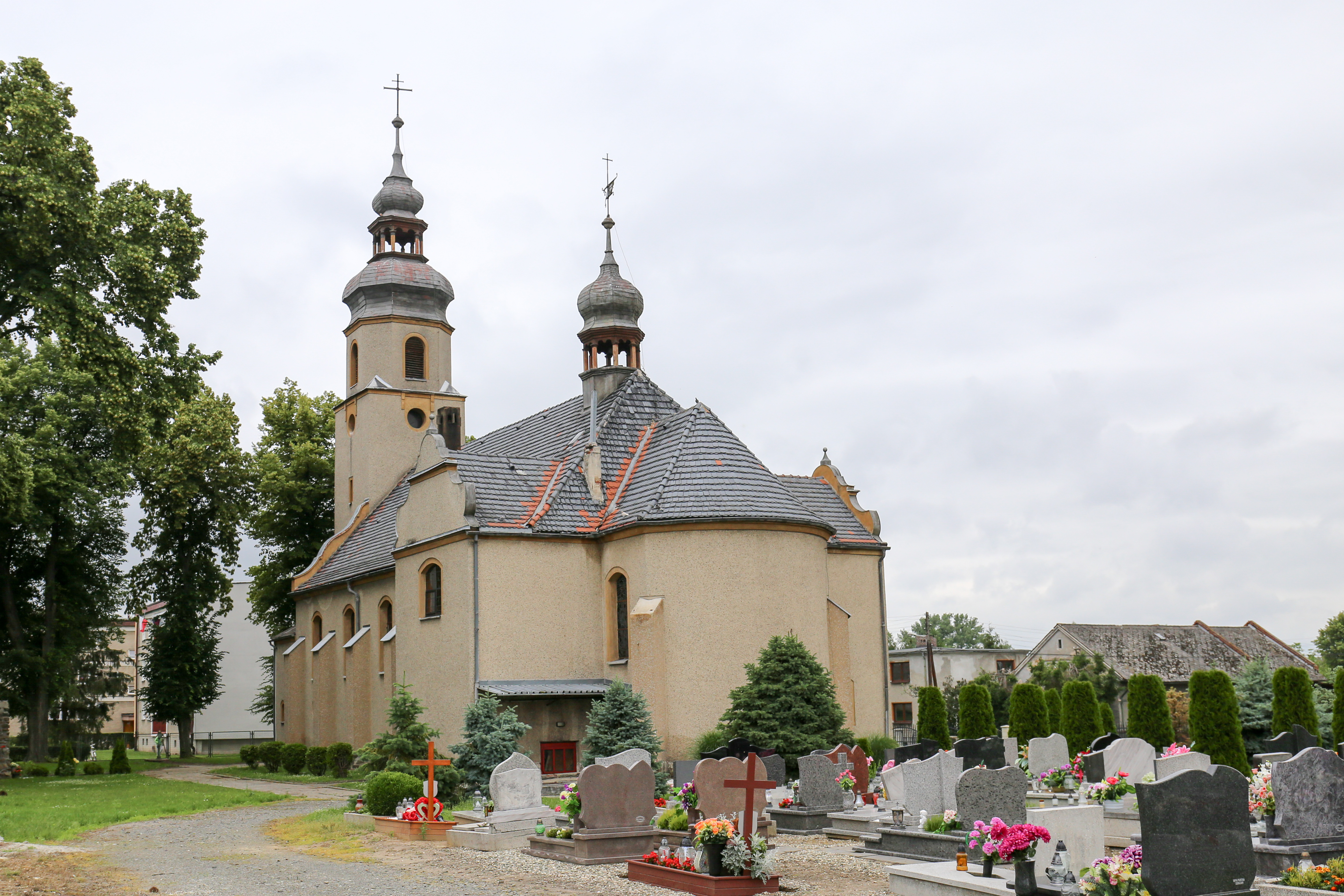 Tłustomosty - wieś w Polsce położona w województwie opolskim, w powiecie głubczyckim, w gminie Baborów.